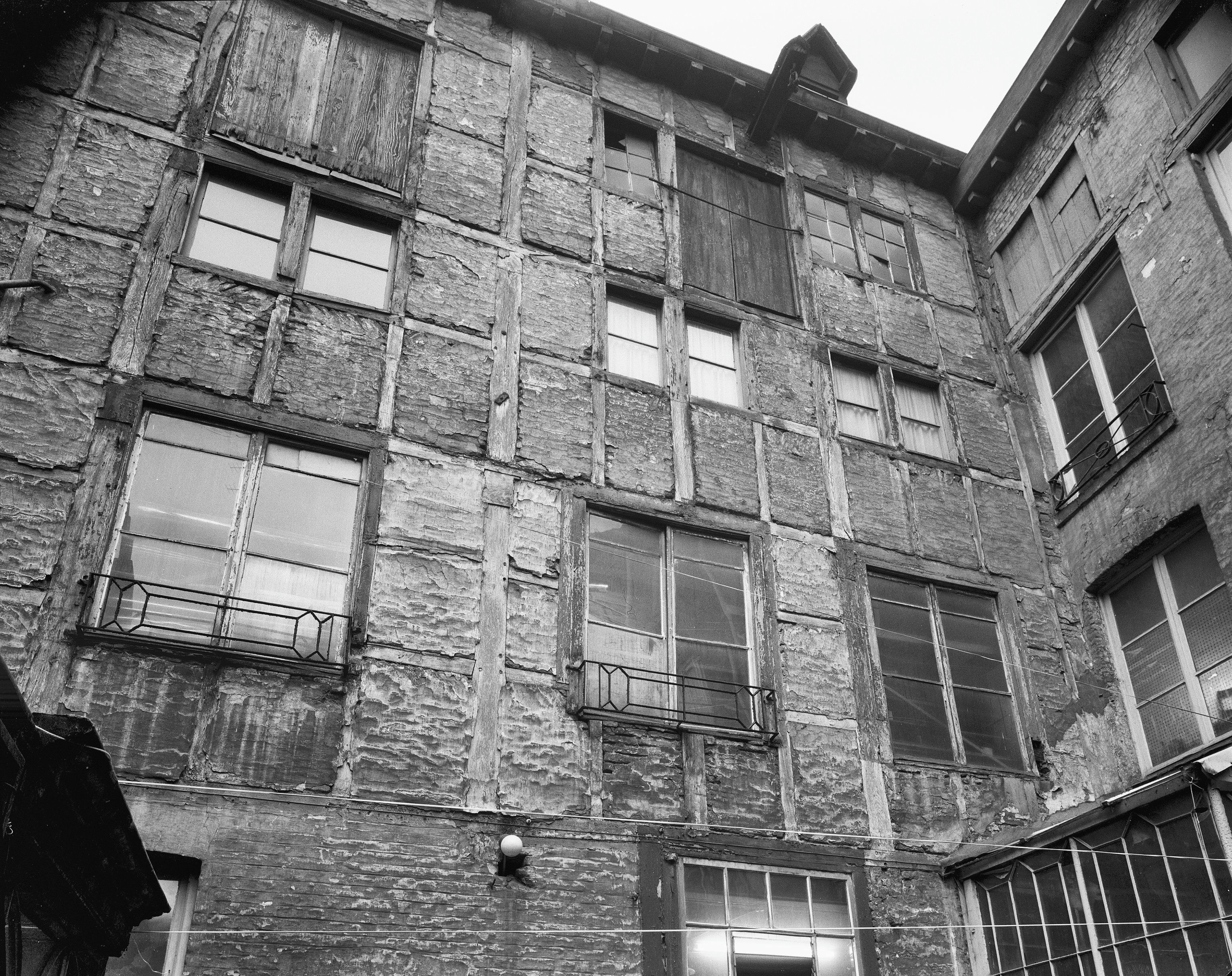 31, zijgevel achterbouw